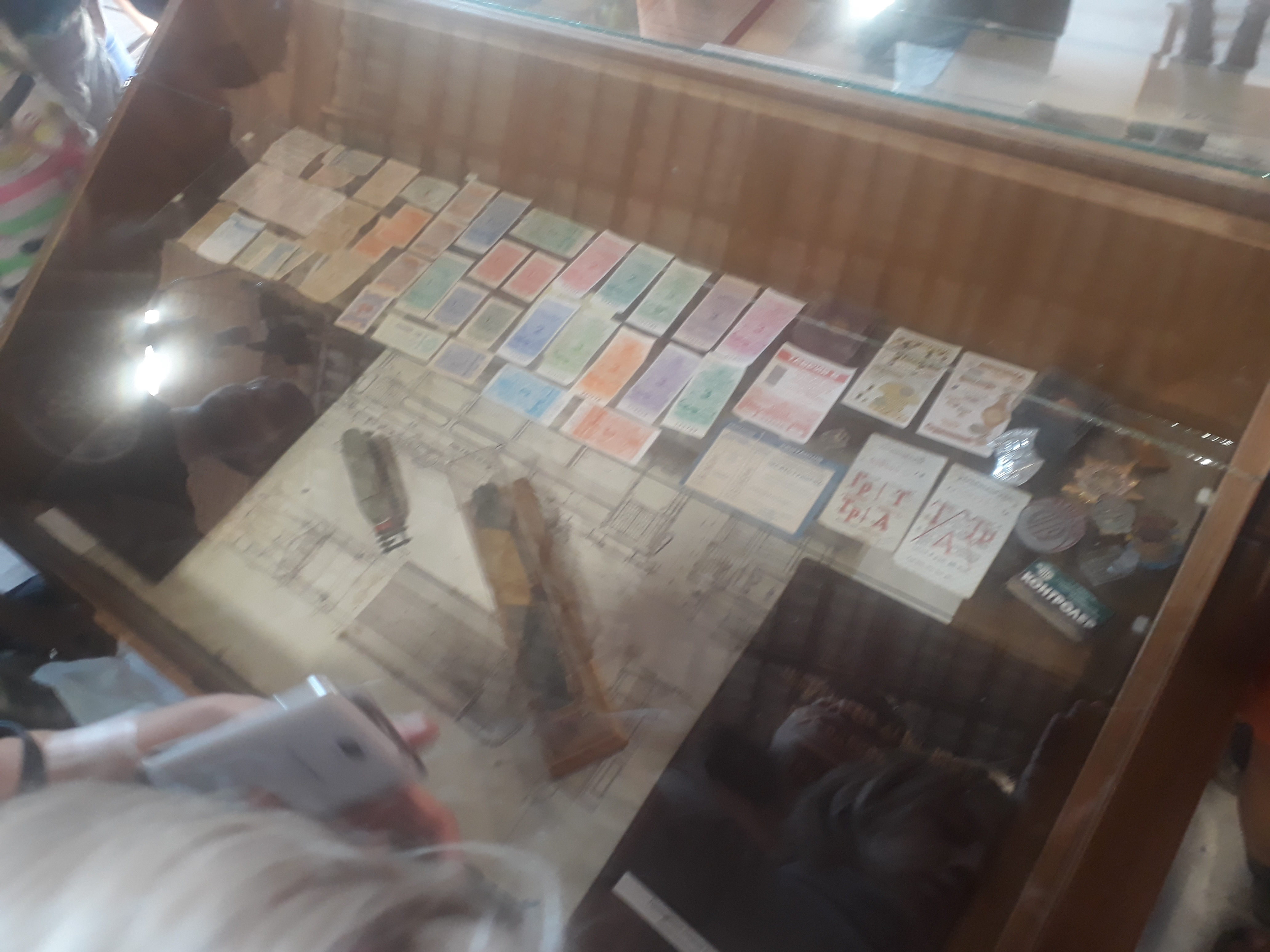 колекція квитків одеського транспорту в музеї електротранспорту